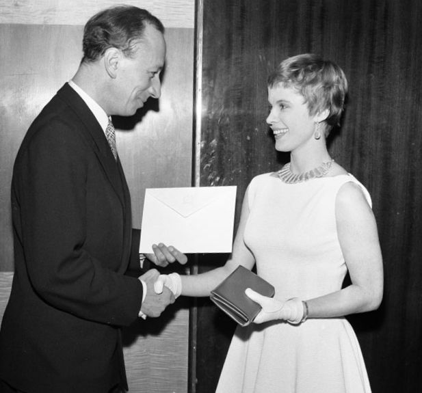 Skandia Biografen. Skådespelerskan Bibi Andersson mottager Daniel Engdahls stipendium på 2000 kr av Gunnar Sjöberg i samband med premiären av Sommarnöje sökes